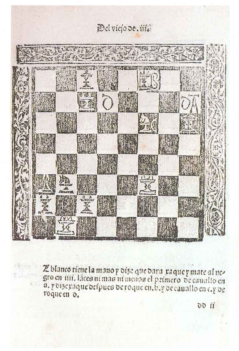 Copie de l'une des études du livre de Luis Ramirez Lucena.